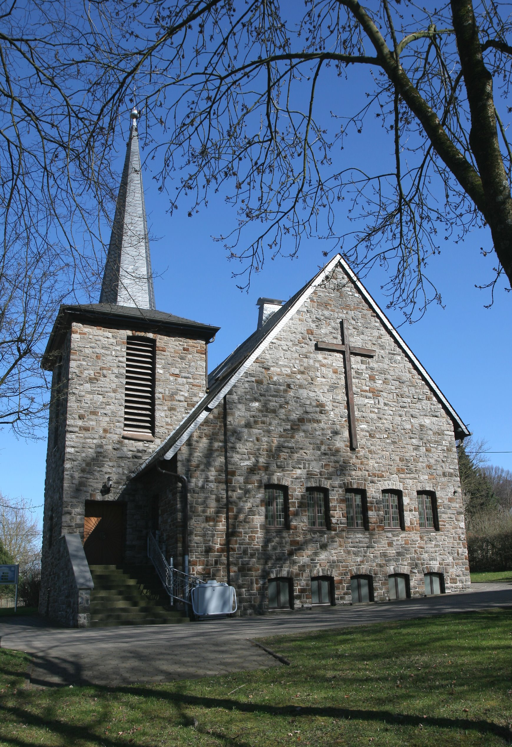 Evangelische Christuskirche in Menden-Lendringsen, Matthias-Claudius-Platz 2.